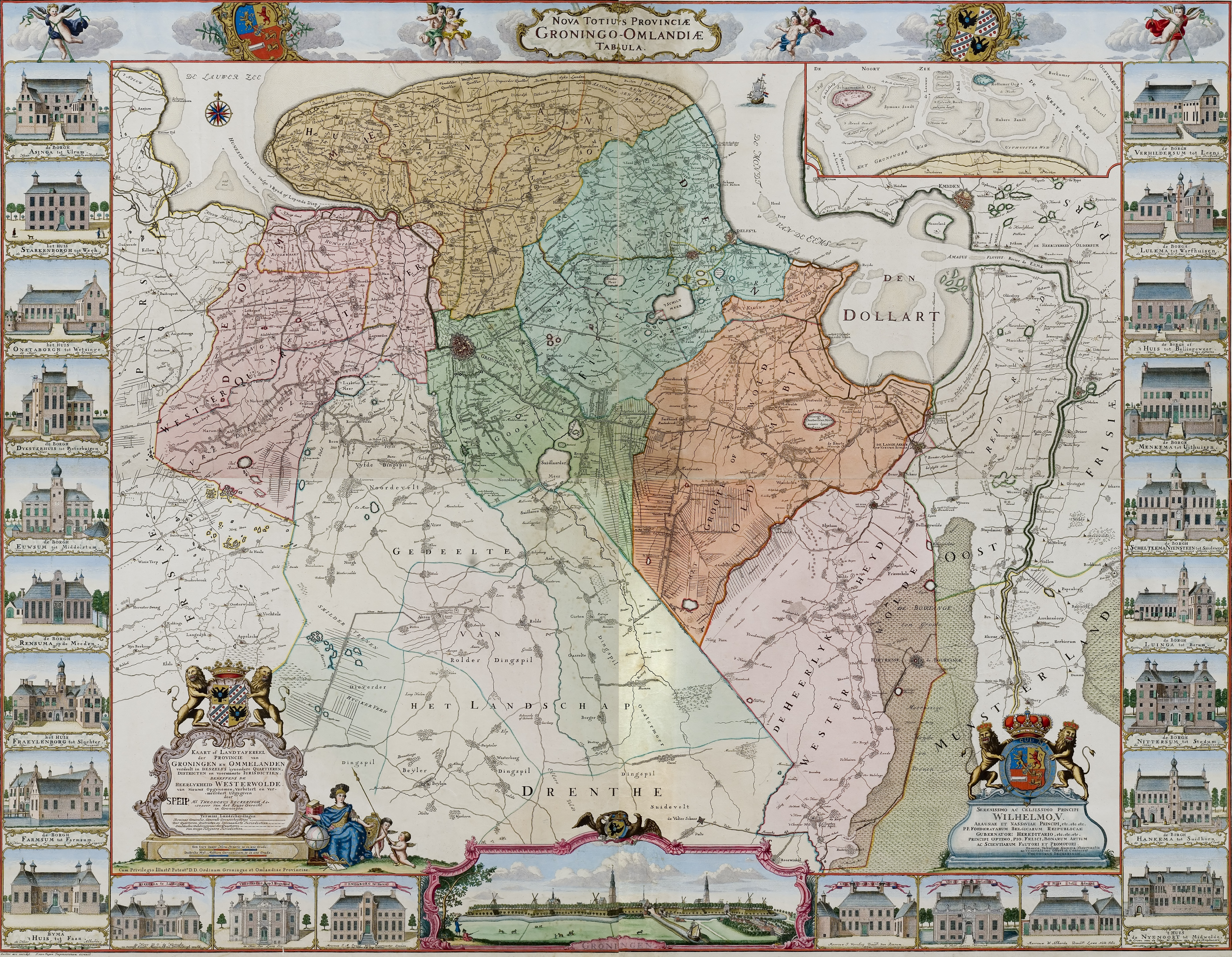 Uitsnede van File:Kaart of landtafereel der provincie van Groningen en Ommelanden full.jpg, waarbij de witruimtes tussen de 4 kaartbladen zoveel mogelijk zijn weggehaald.